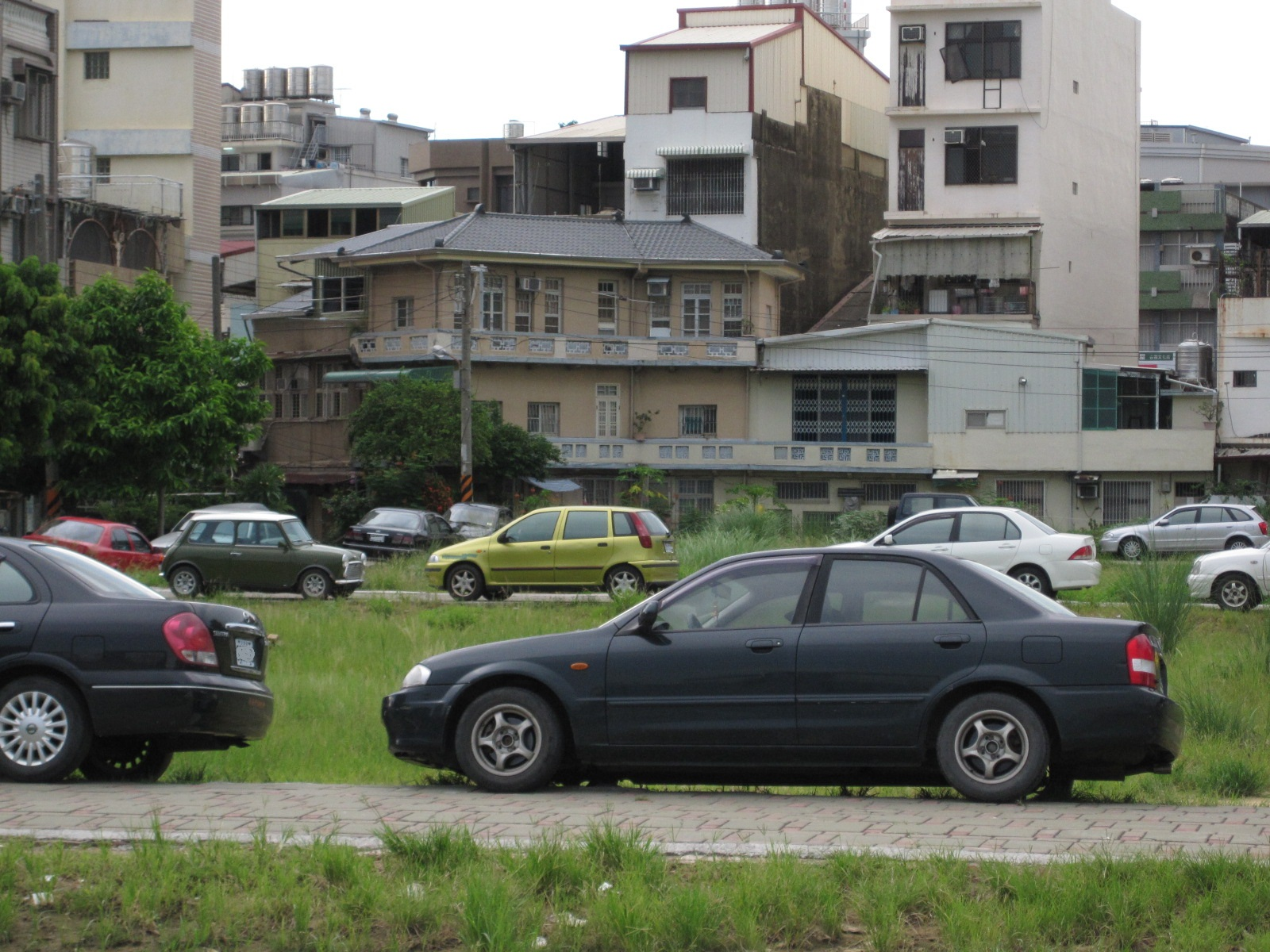 臺南刑務所宿舍群遺跡，之後要作為公園綠地。